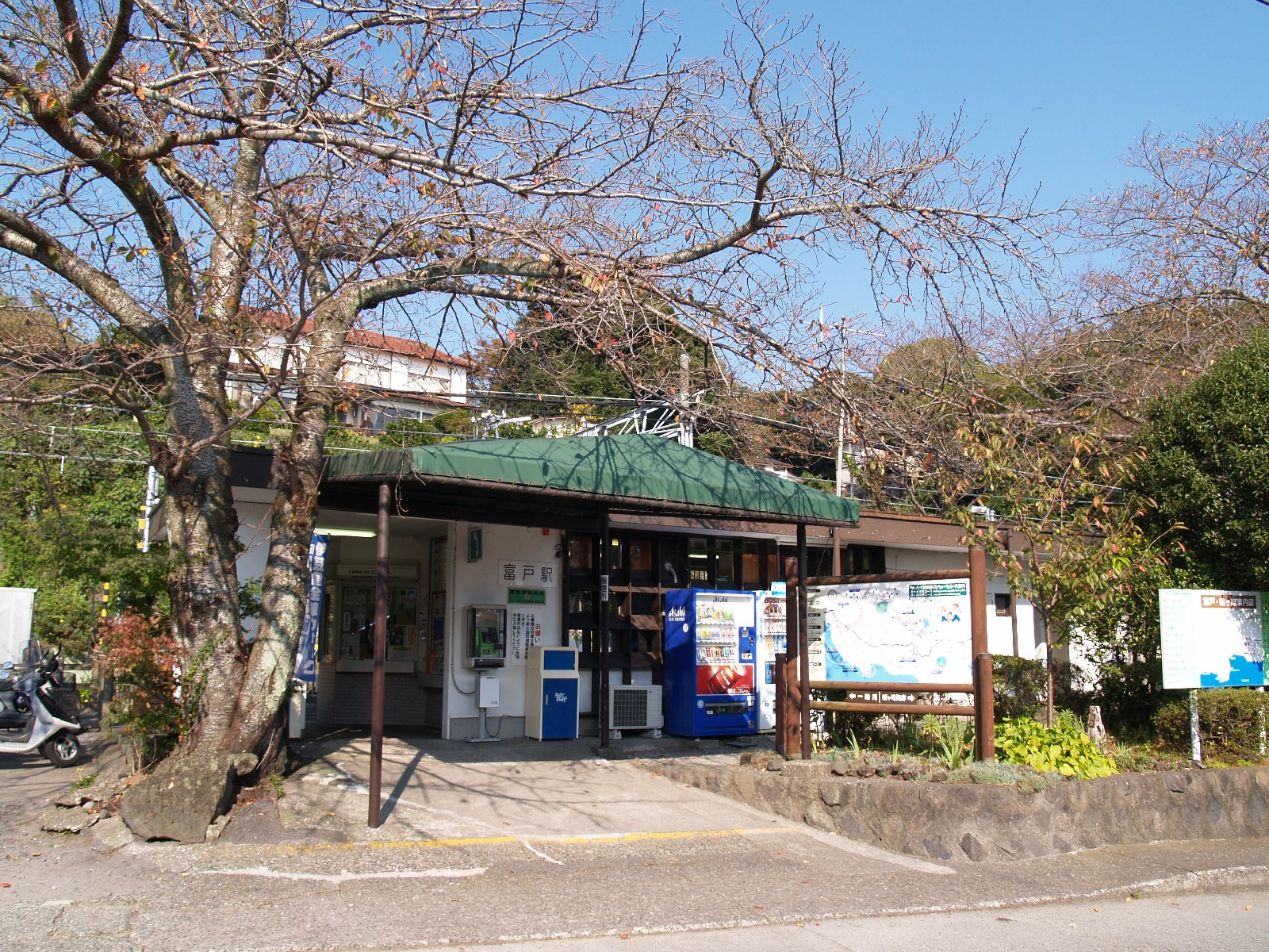 富戸駅